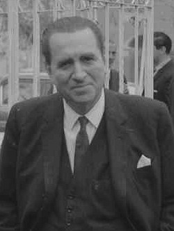 Luis Felipe Letelier Icaza, político chileno